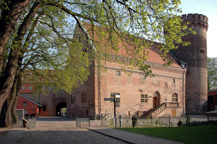 Palas mit Juliusturm Foto des Palas/Zitadelle in Berlin/Spandau.